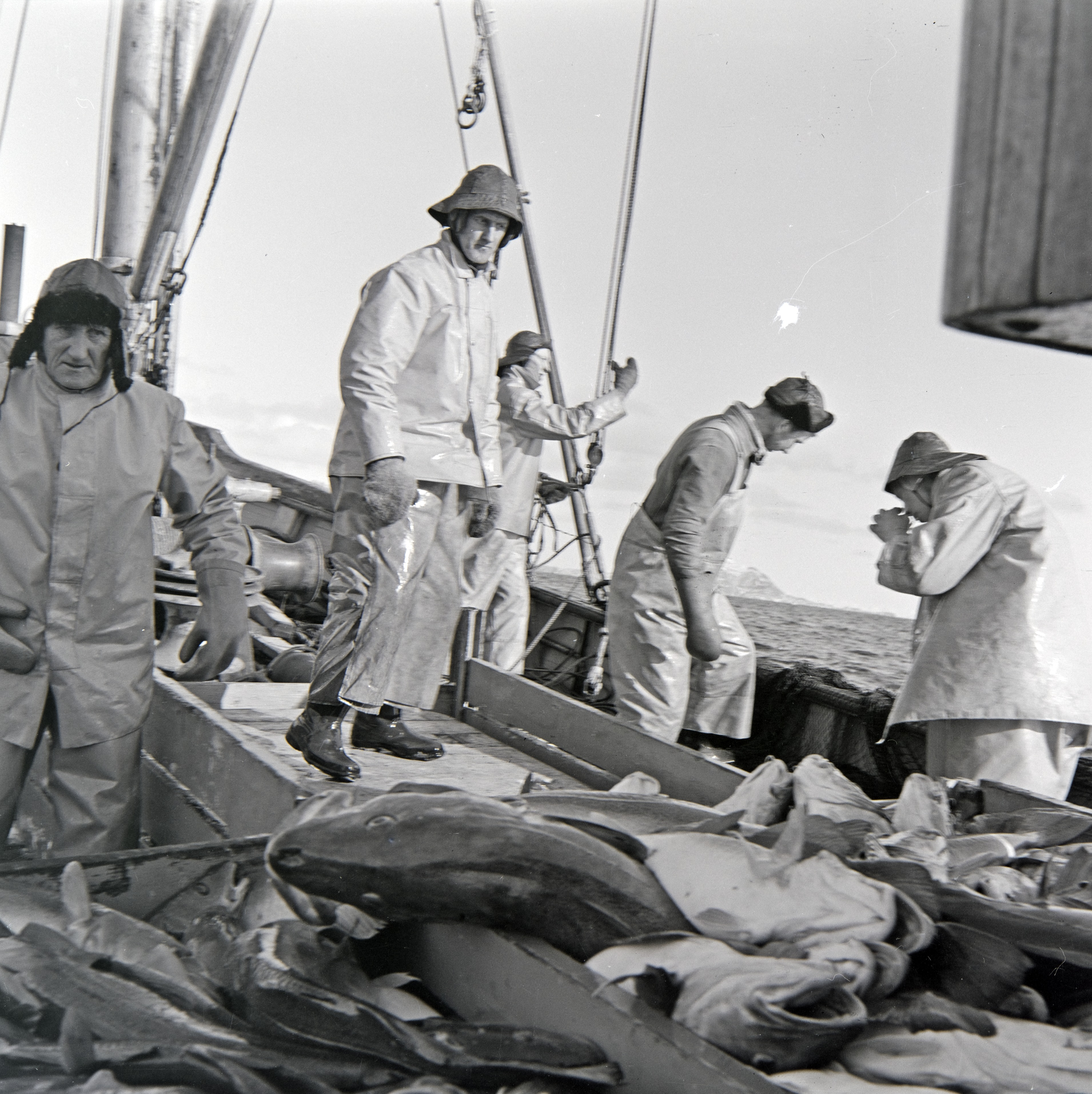 Bildet er hentet fra Nordlandsmuseet bildesamling etter Kanstad. Motivbeskrivelse: Fiske, båtlag Nøkkelord: Fiske Organisasjon og fordeling av fiskefangst Drakt, kroppsdel, hel drakt Drakt, hode Drakt, hånd Båter og fartøyer